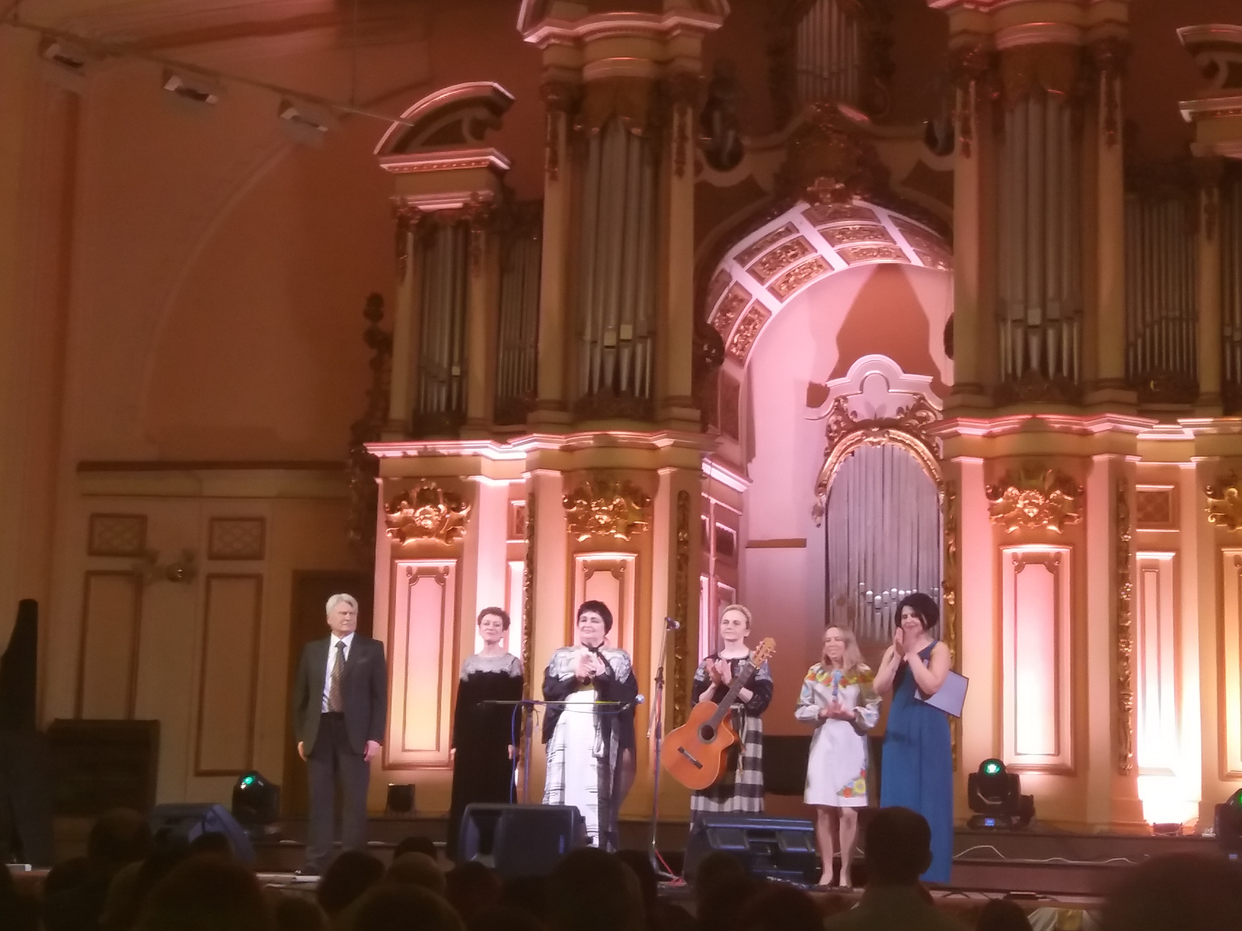 Творчий вечір до Дня народження Ліни Костенко у Львівській обласній філармонії. 12.03.2018